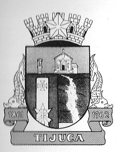 Brasão do bairro carioca da Tijuca.